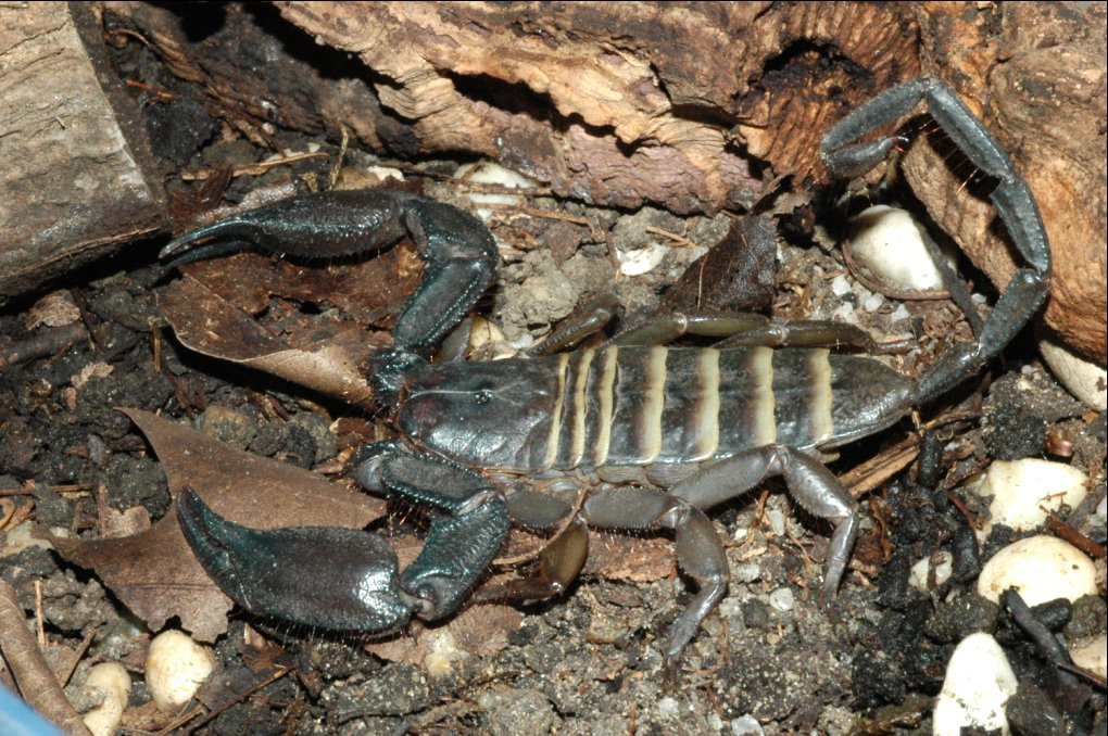 Hadogenes paucidens Pocock, 1896, Scorpiones, Hemiscorpiidae.